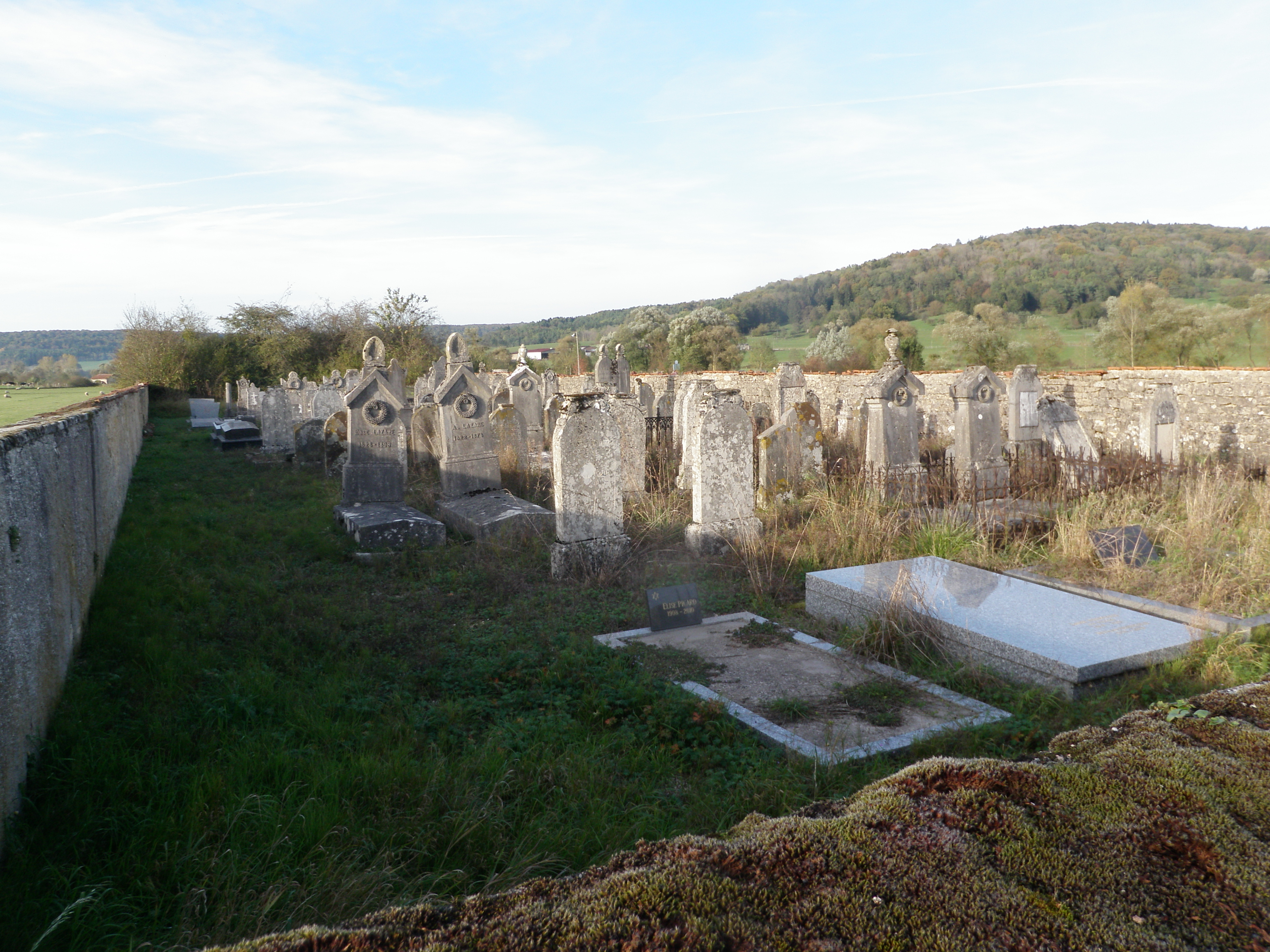 Cimetière israélite